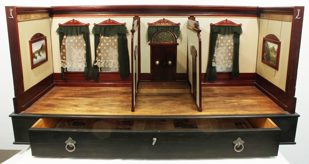 Aus klappbare Puppenstube mit drei Räumen, drei Fenstern und einer Tür zu einem Balkon mit Blumenschmuck. Lose Teile und Zwischenwände liegen in einer Schublade bei. Außer den Blumenkästen des Balkons befinden sich jedoch keinerlei Einrichtungsgegenstände